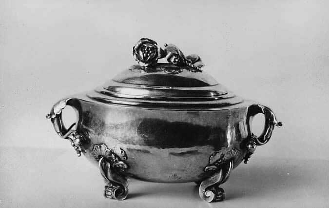 Sugar bowl; Metalwork-Silver